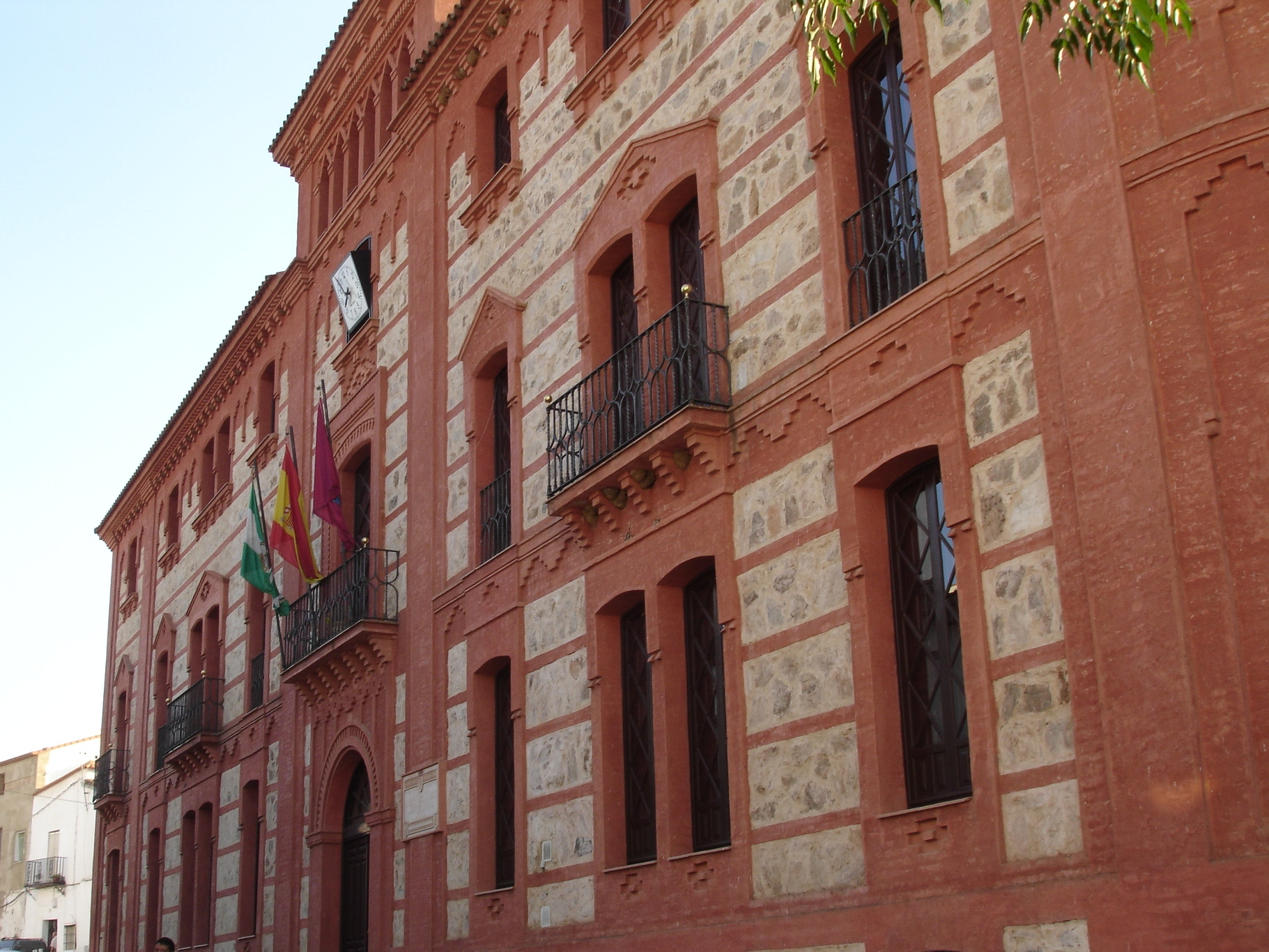 Fachada del Ayuntamiento de Aracena (Huelva, España).Façade of the Aracena Town Hall (Huelva, Spain)